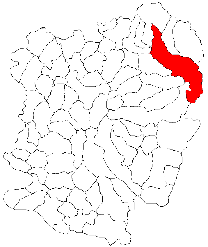 Categorie:Hărţi ale judeţului Caraş-Severin